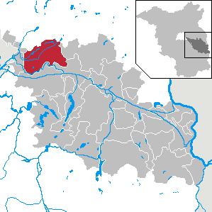 Grünheide (Mark) in Brandenburg (Country) - District Oder-Spree